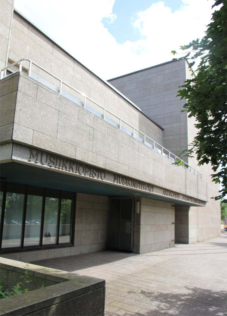 Vantaan musiikkiopiston toimipiste Tikkurilan kirjastotalon 2. kerroksessa.